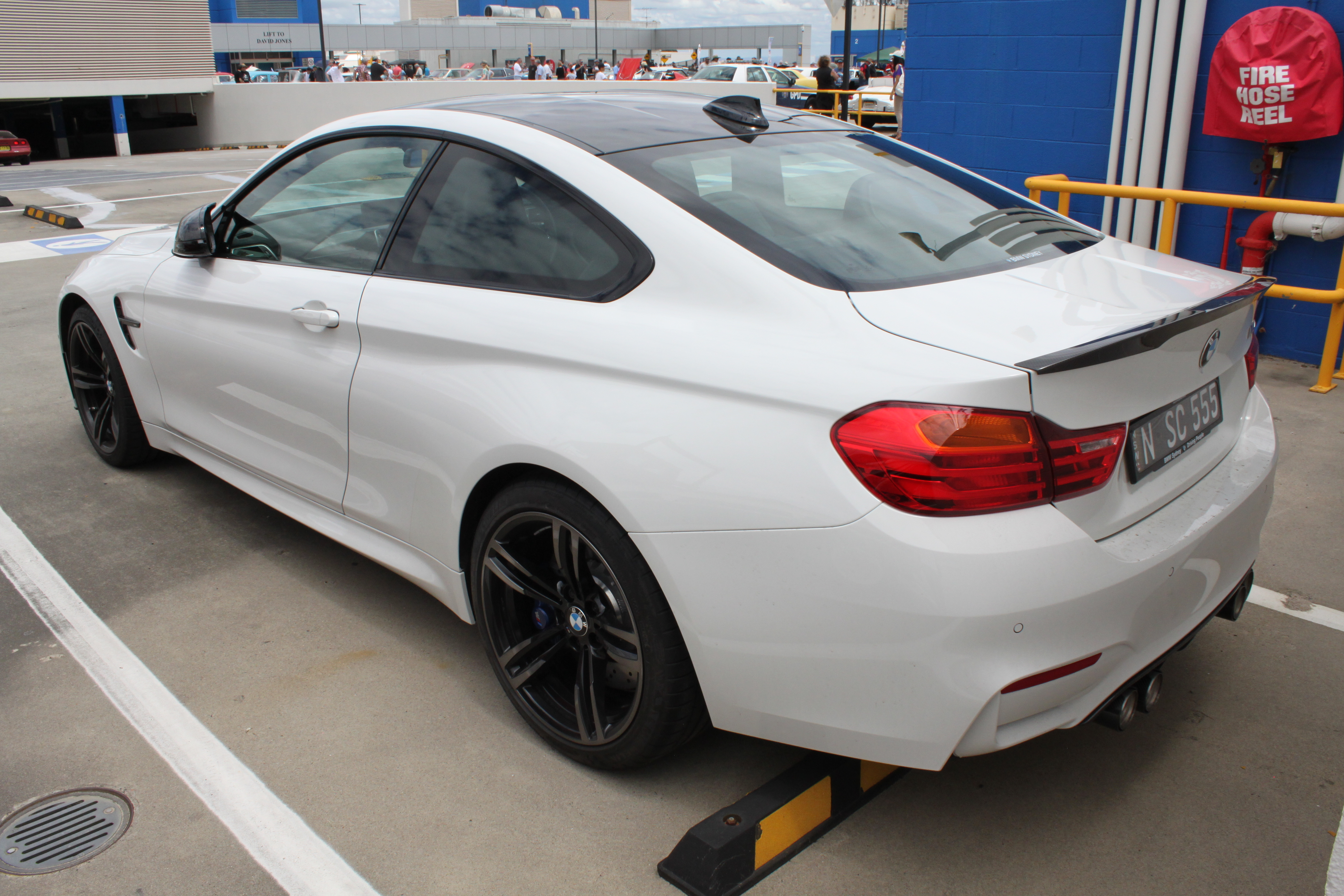 BMW M4 F82